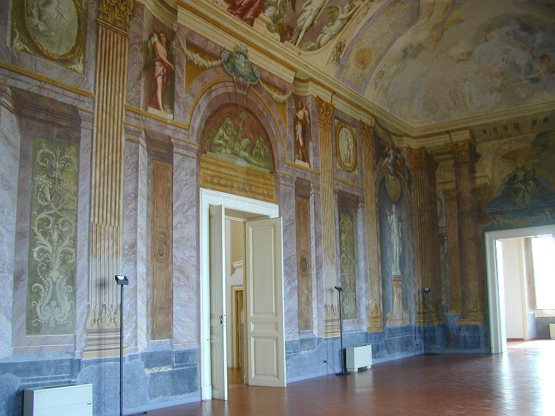 Ercolano (Napoli): Villa Campolieto, salone